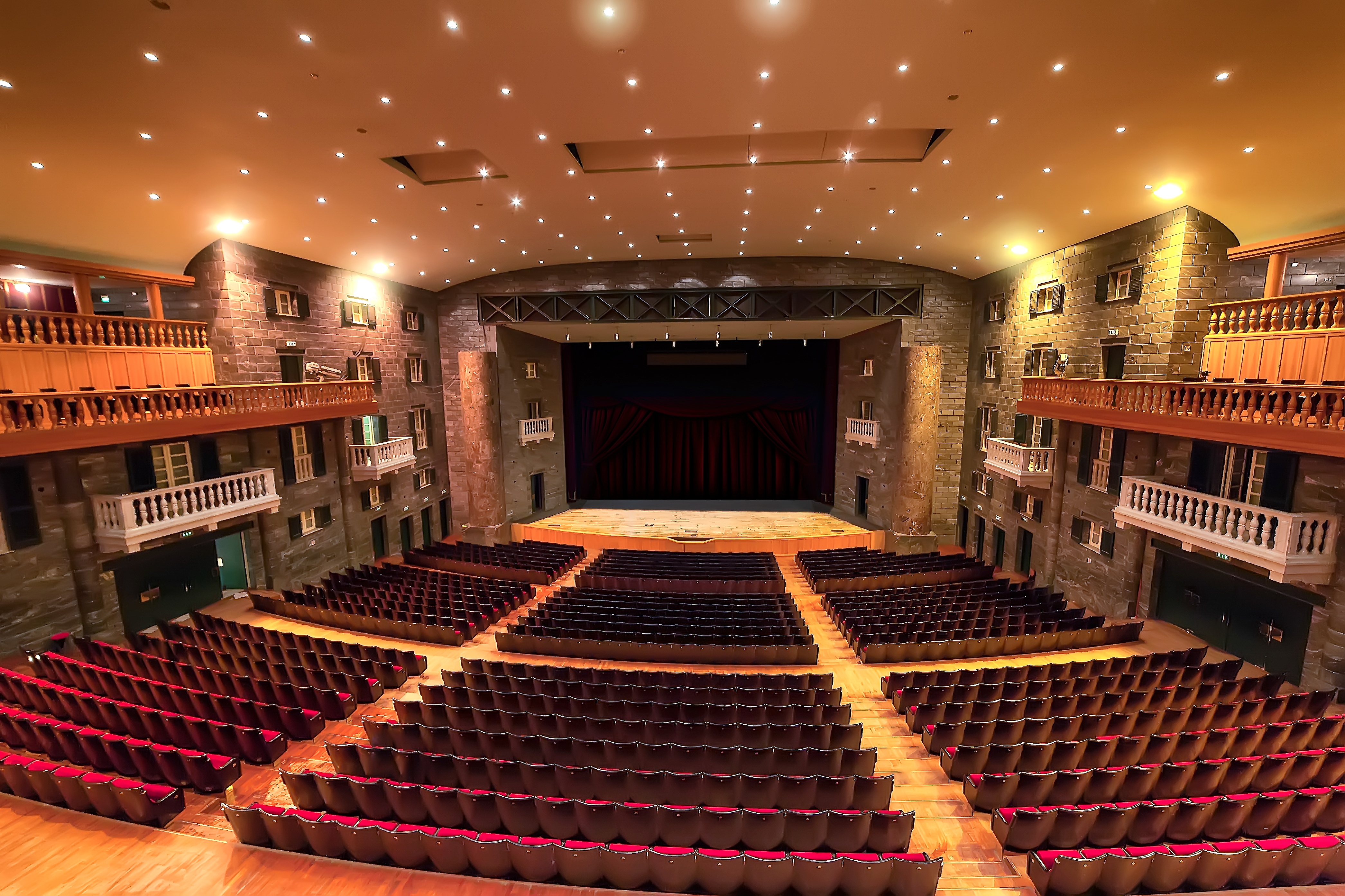 Teatro Carlo Felice This is a photo of a monument which is part of cultural heritage of Italy.